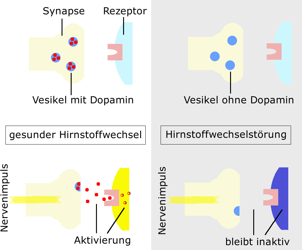 Normal funktionierende und gestörte Aktivierung im Dopaminstoffwechsel. Schaubild von Synapse und Rezeptor. Selbst erstellte Grafik.